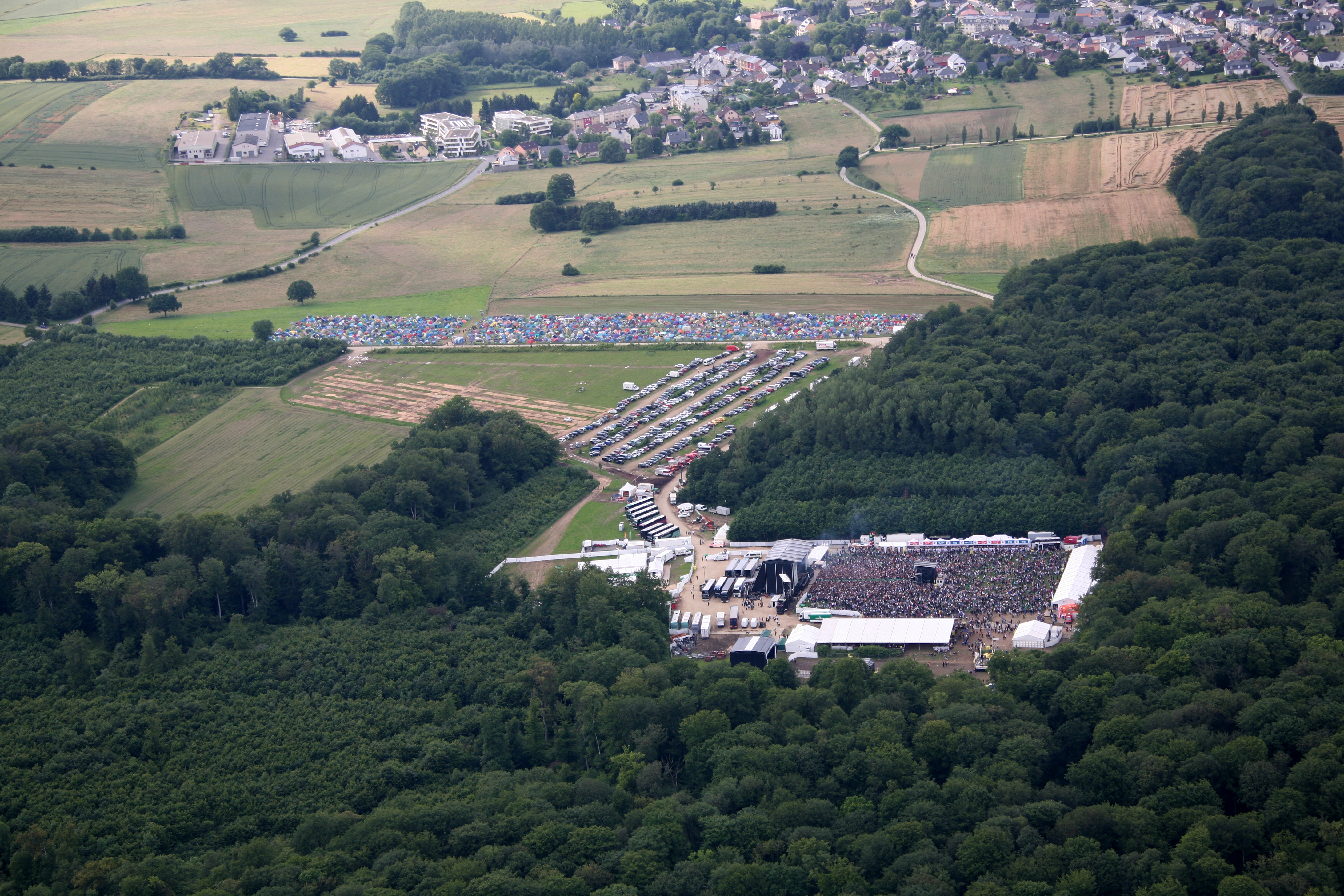 Rock A Field 2012 zu Réiser.